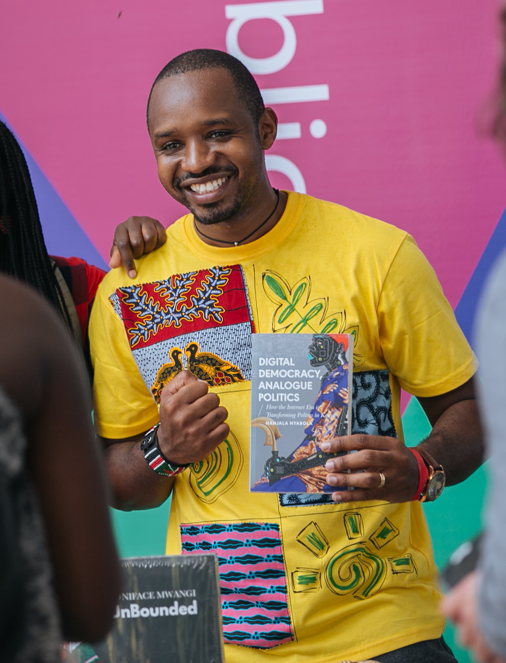 Photo: © Nana Afriyie